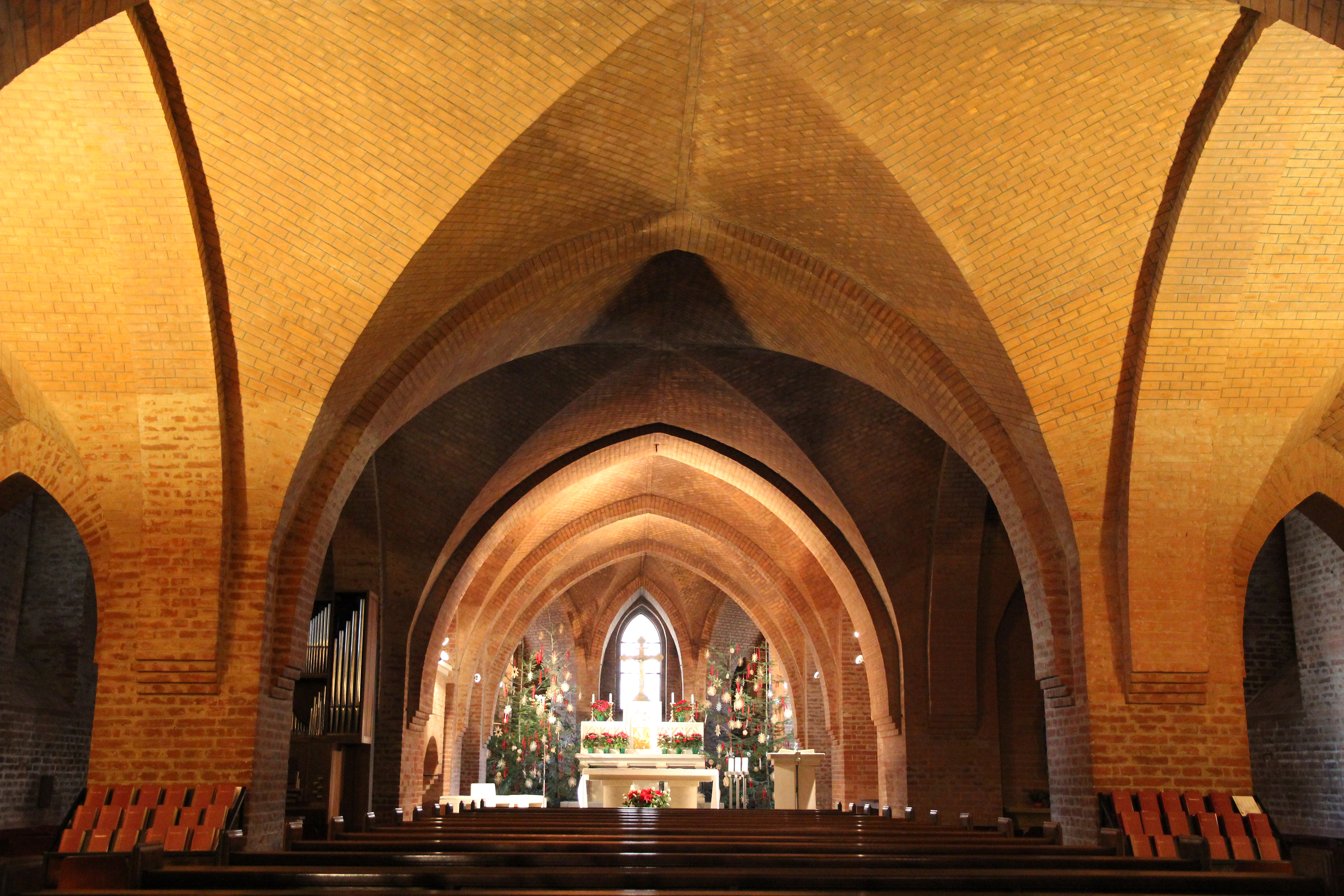 Herz-Jesu-Kirche und Teil der Ummauerung